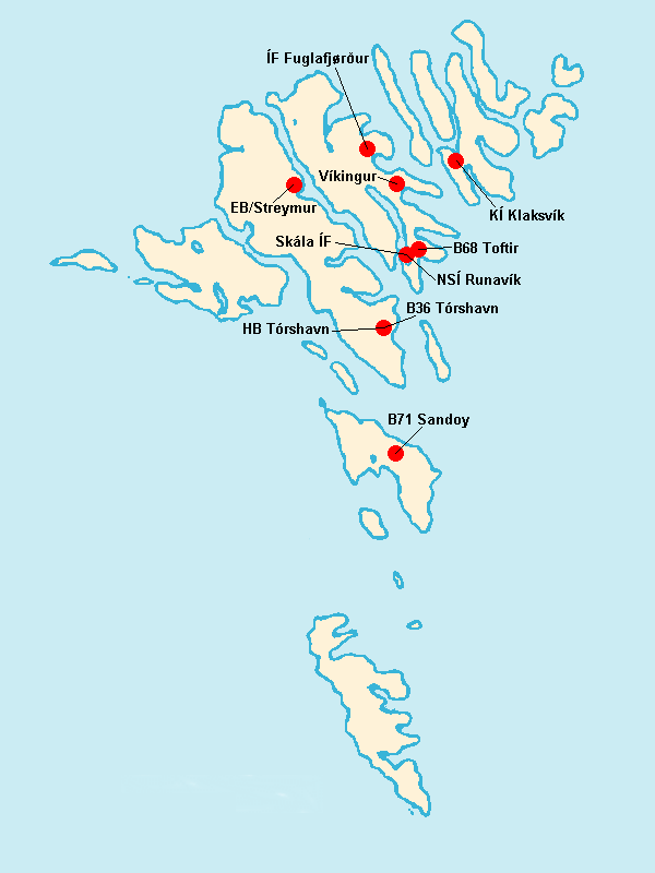 Répartition des clubs en Formuladeildin 2008.